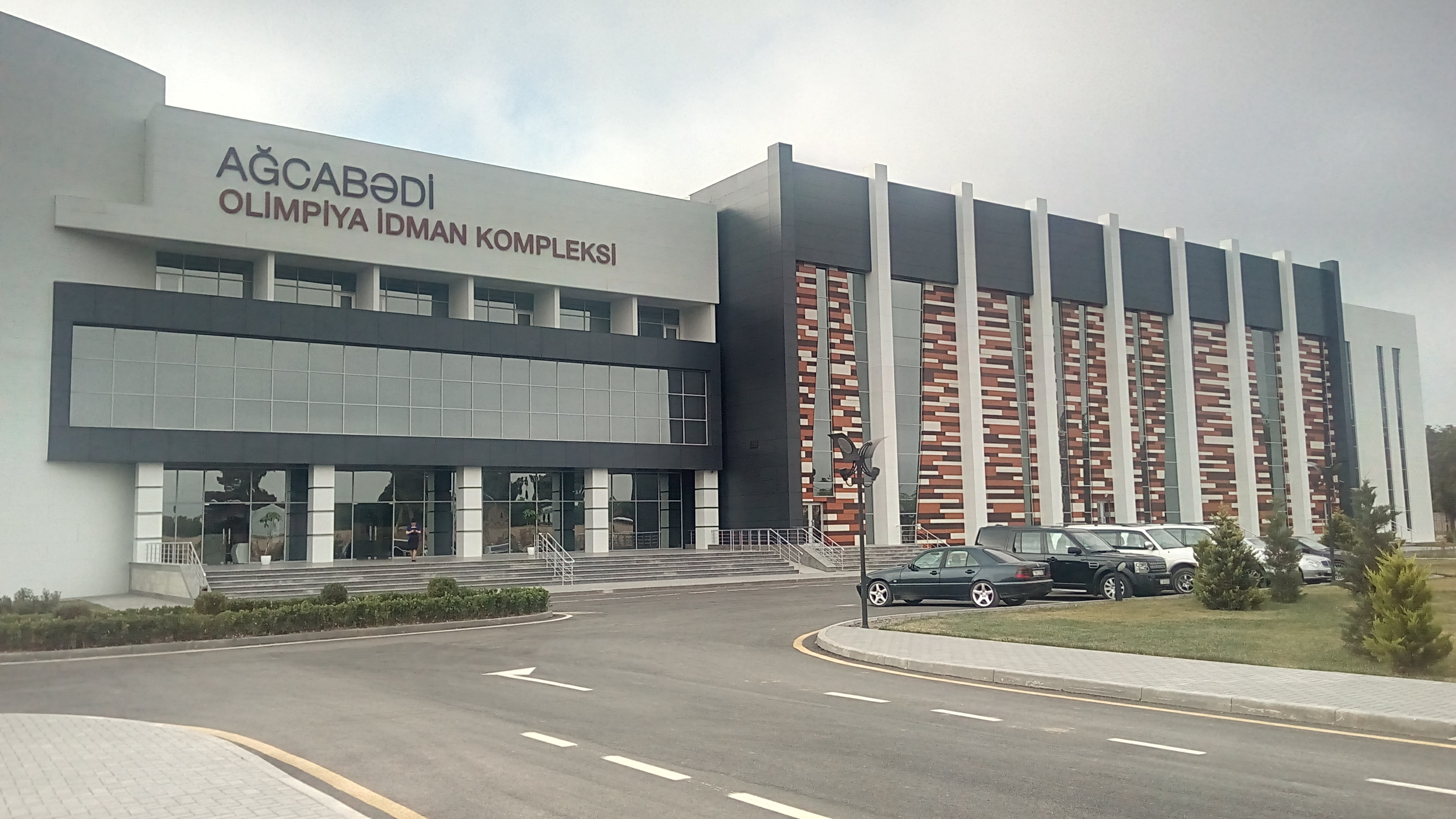 Ağcabədi OİK